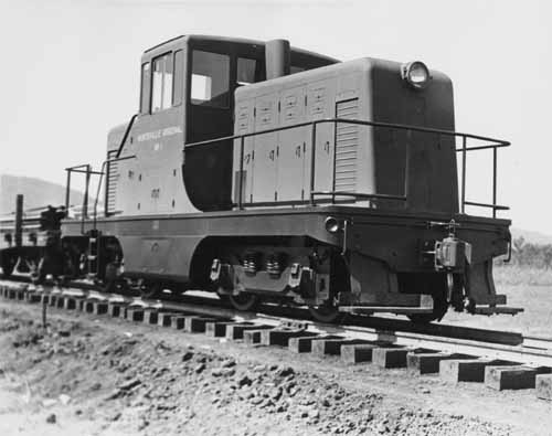 Huntsville Arsenal railroad engine.